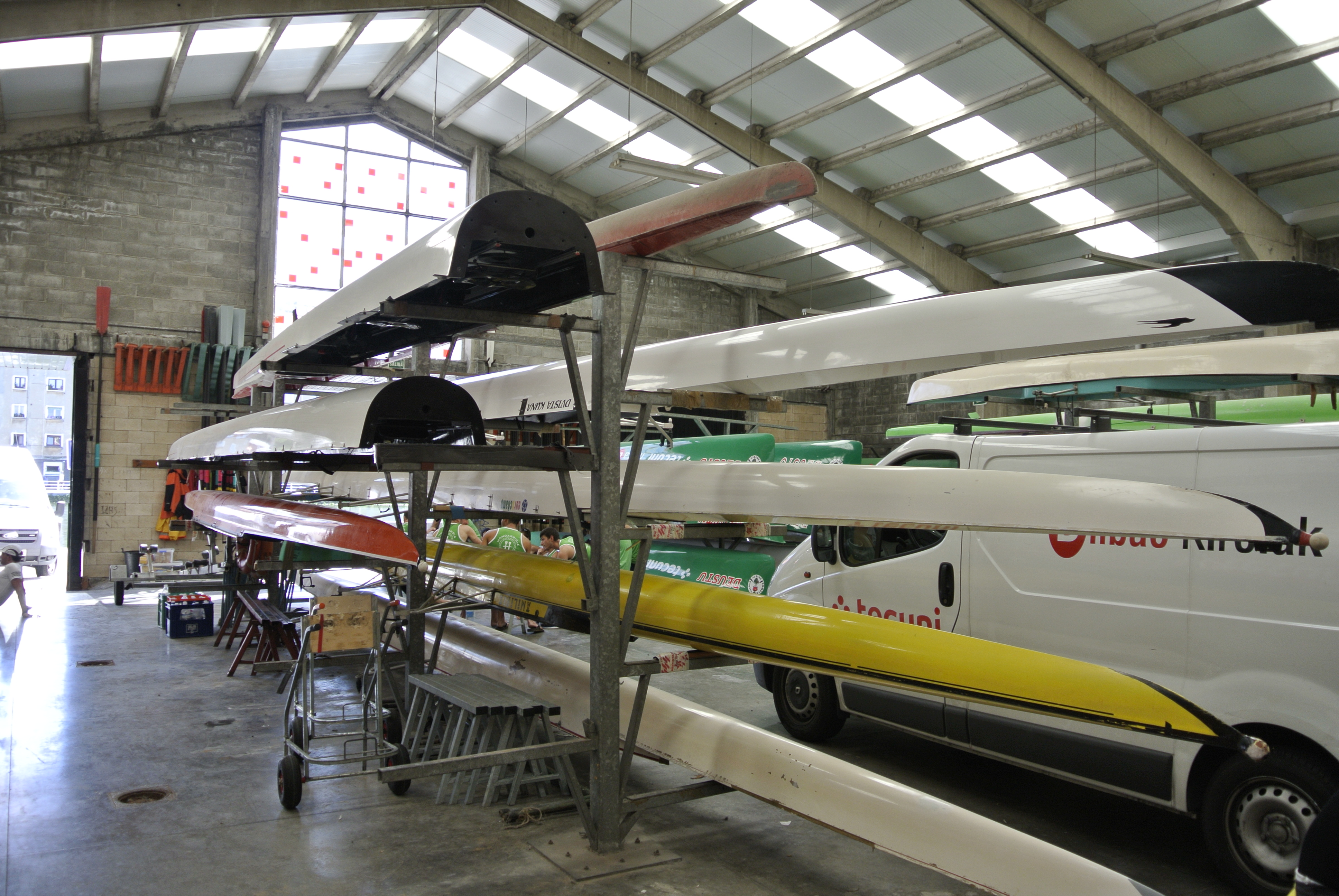 Embarcaciones de banco móvil en el Club de Remo Deusto